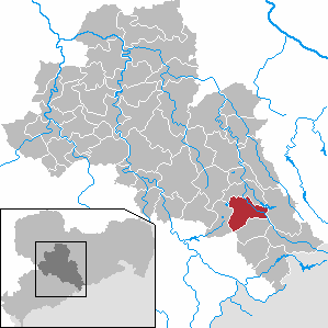 Mulda/Sa. in Saxony - district Mittelsachsen